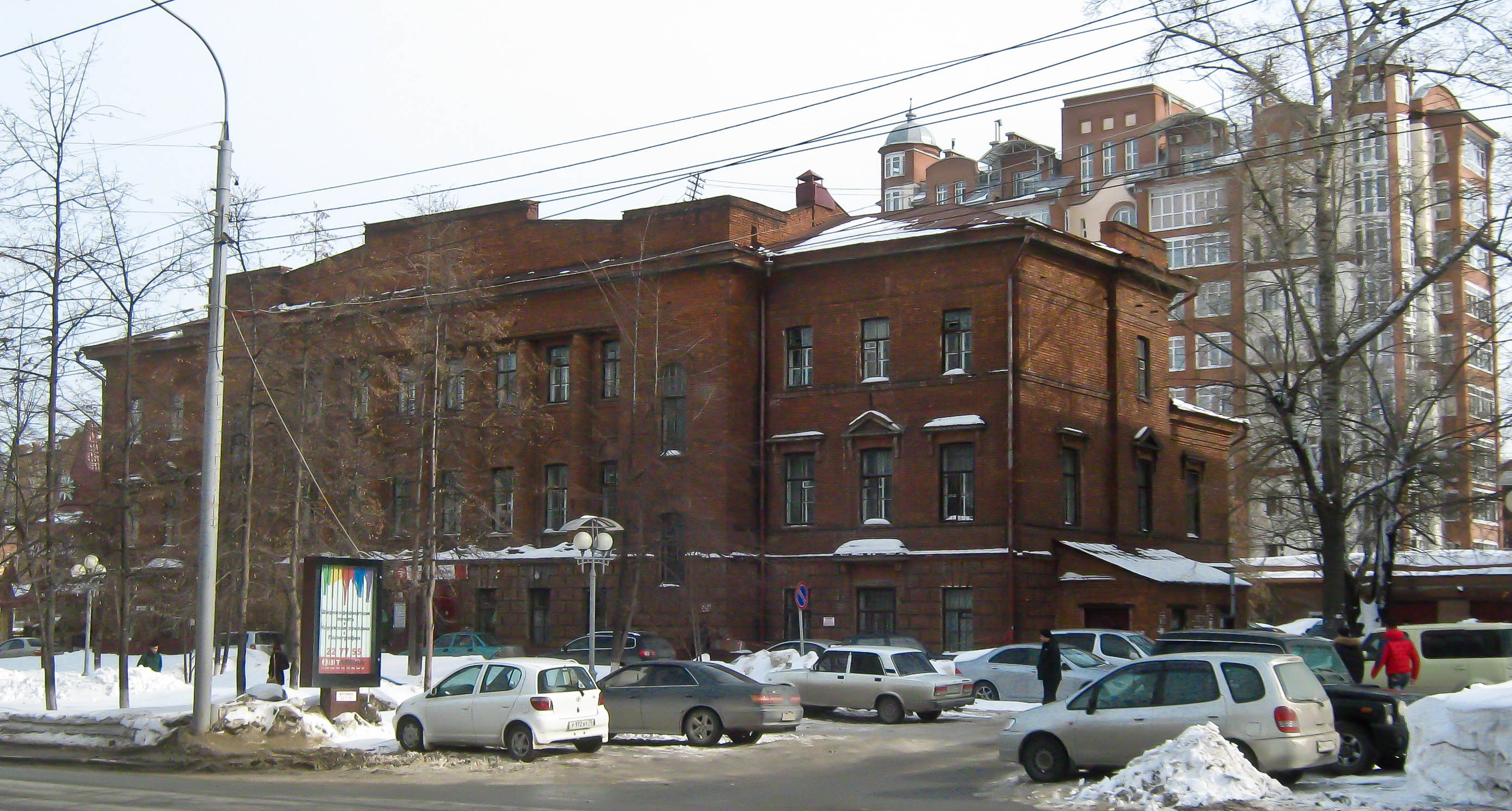 Проспект Ленина 51, Томск